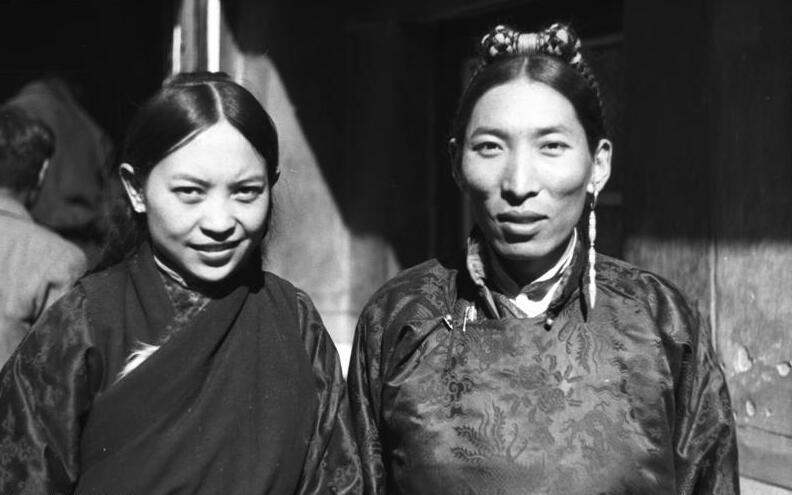 Tibetexpedition, Herr und Frau Dzongpen Gyantse, Herr und Frau Dzongpön. [Gyantse, Mr. und Mrs. Dzongpon.; Tracht]